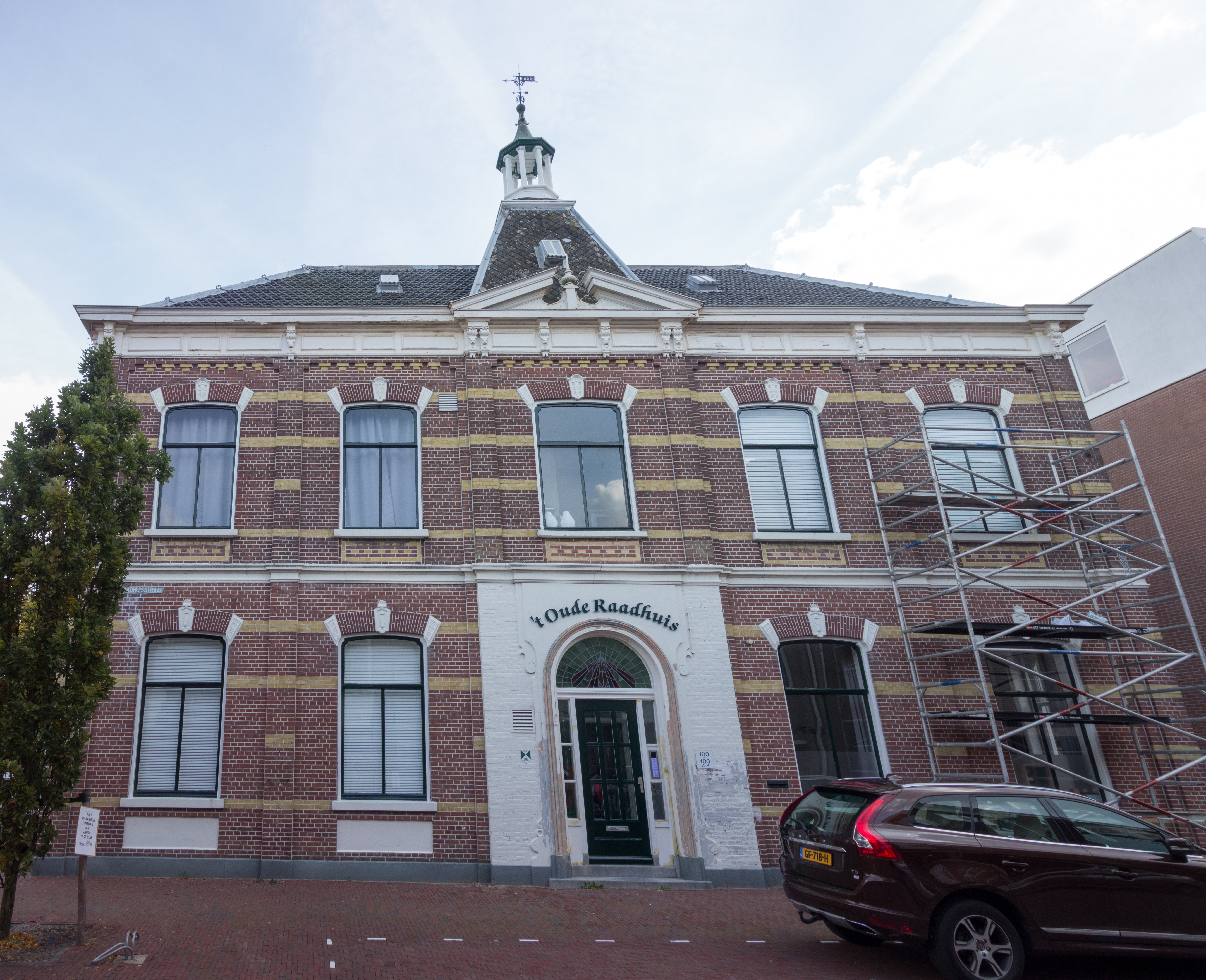 Het voormalige raadhuis van Aarlanderveen aan de Raadhuisstraat in Alphen aan den Rijn.